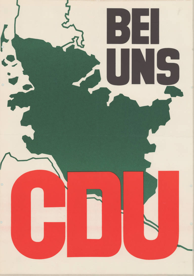 Bei uns CDU Abbildung: Landkarte Schleswig-Holsteins (Grafik) Kommentar: Vgl. Plakat Nr. 10-012-200. Plakatart: Motiv-/Textplakat Auftraggeber: Verantw.: CDU-Landesverband Schleswig-Holstein Objekt-Signatur: 10-012 : 251 Bestand: Landtagswahlplakate Schleswig-Holstein (10-012) GliederungBestand10-18: Landtagswahlplakate Schleswig-Holstein (10-012) » CDU Lizenz: KAS/ACDP 10-012 : 251 CC-BY-SA 3.0 DE